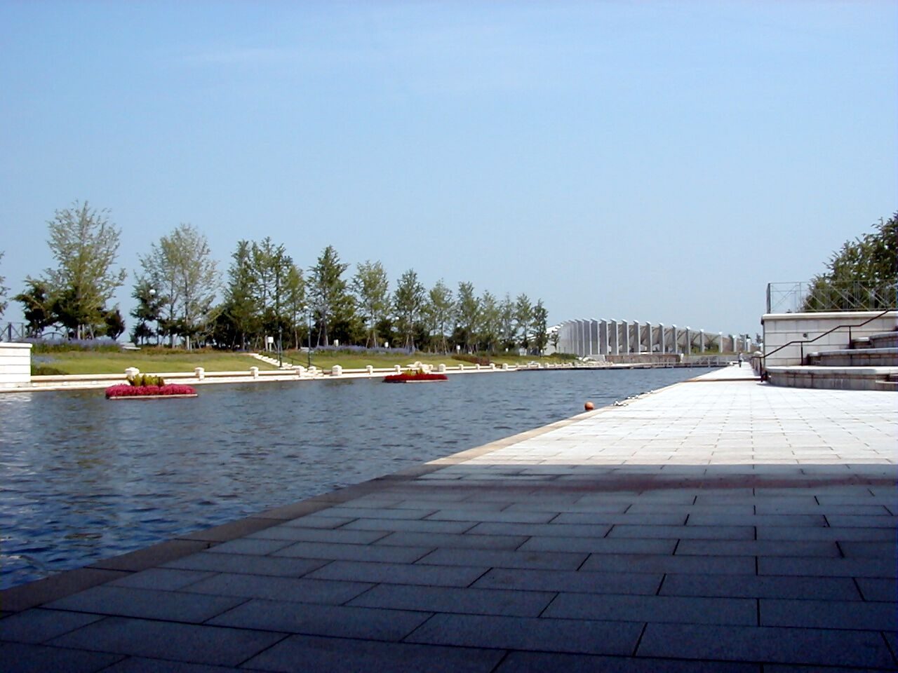 鳥屋野潟公園_カナール